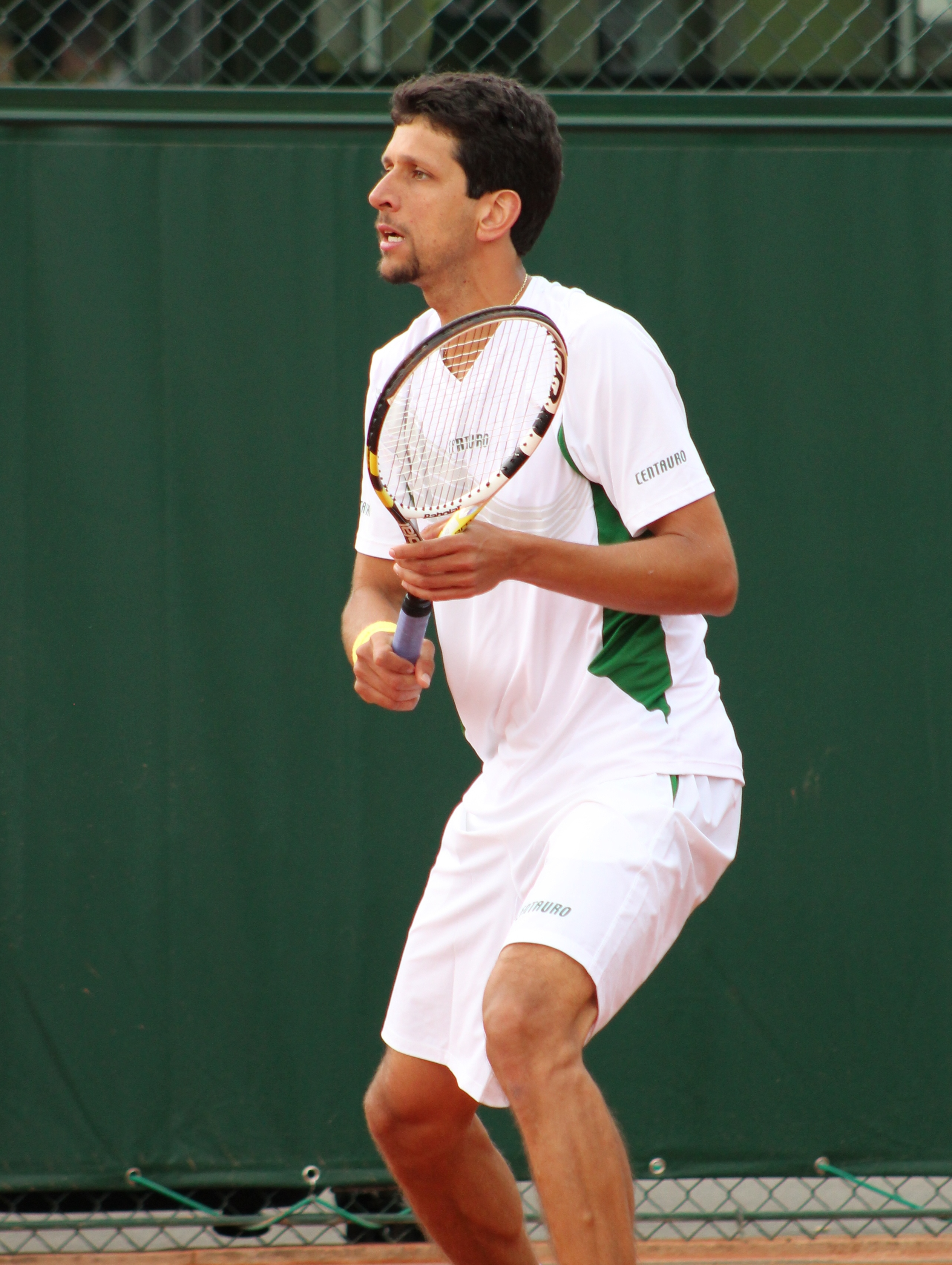 Melo RG13 (2)